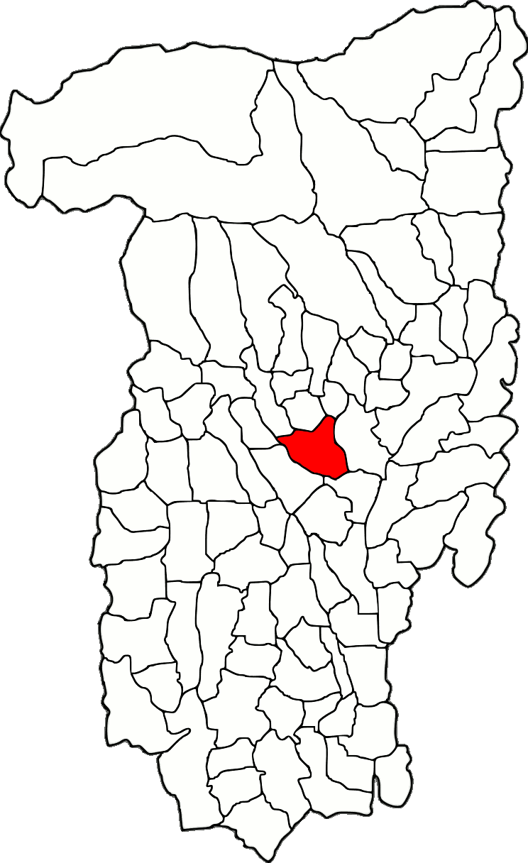 Lage der Gemeinde Frâncești im Kreis Vâlcea (RO).